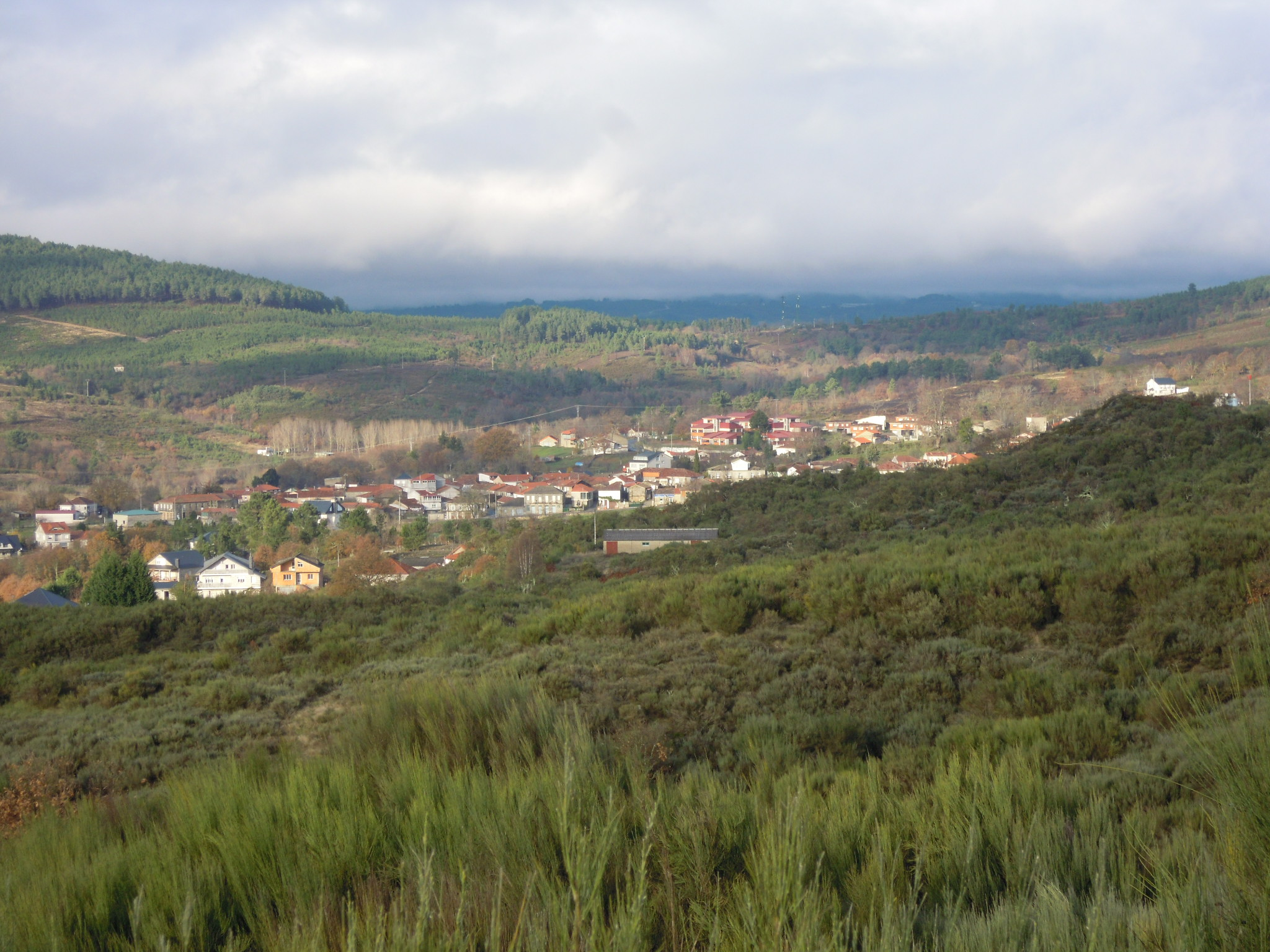 Vista xeral da vila de Vilardevós.